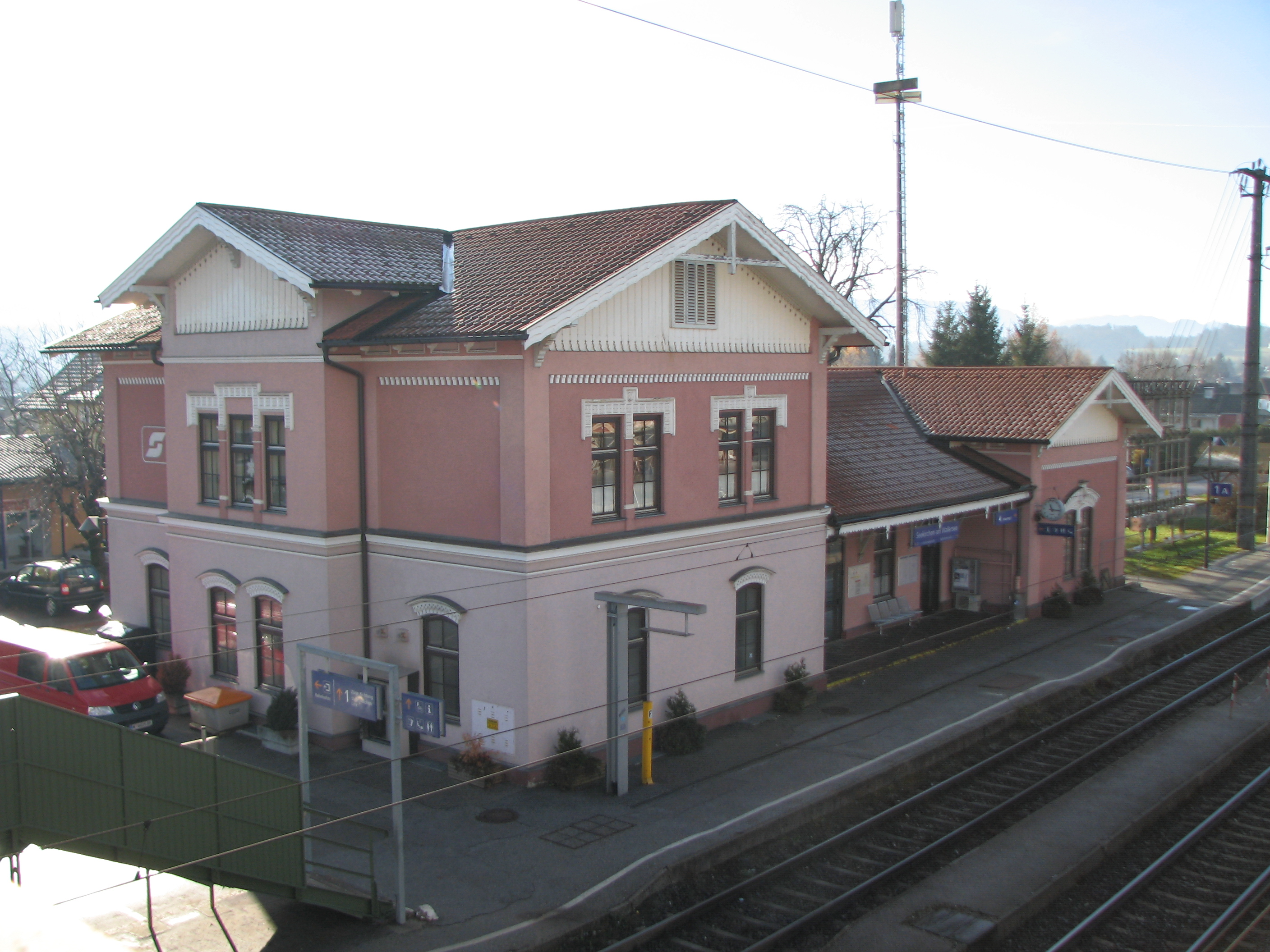 Aufnahmsgebäude Seekirchen